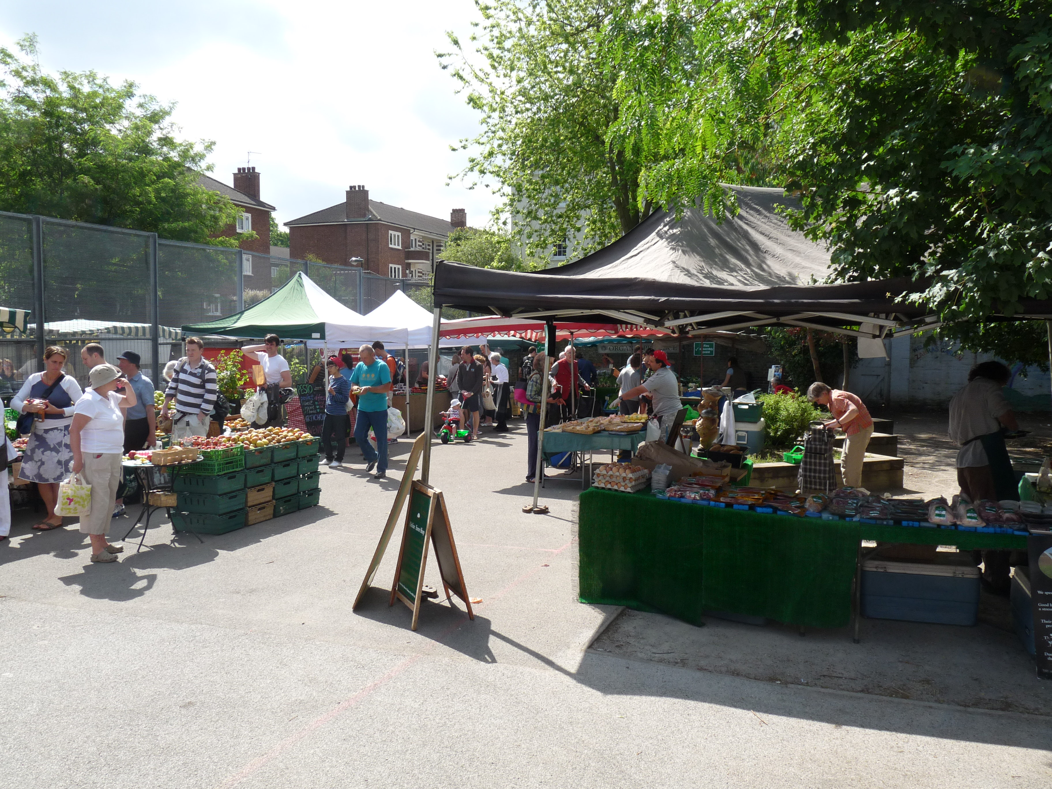 Islington Farmers' Market